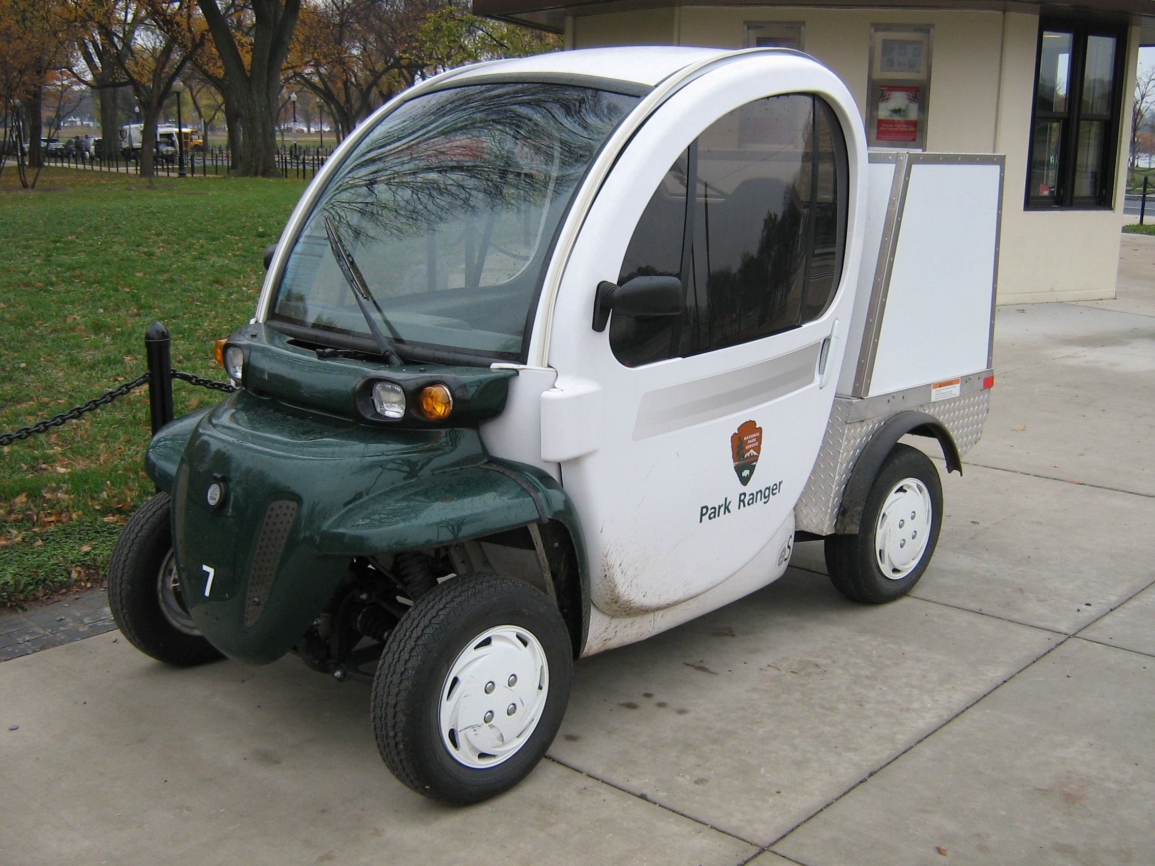 GEM